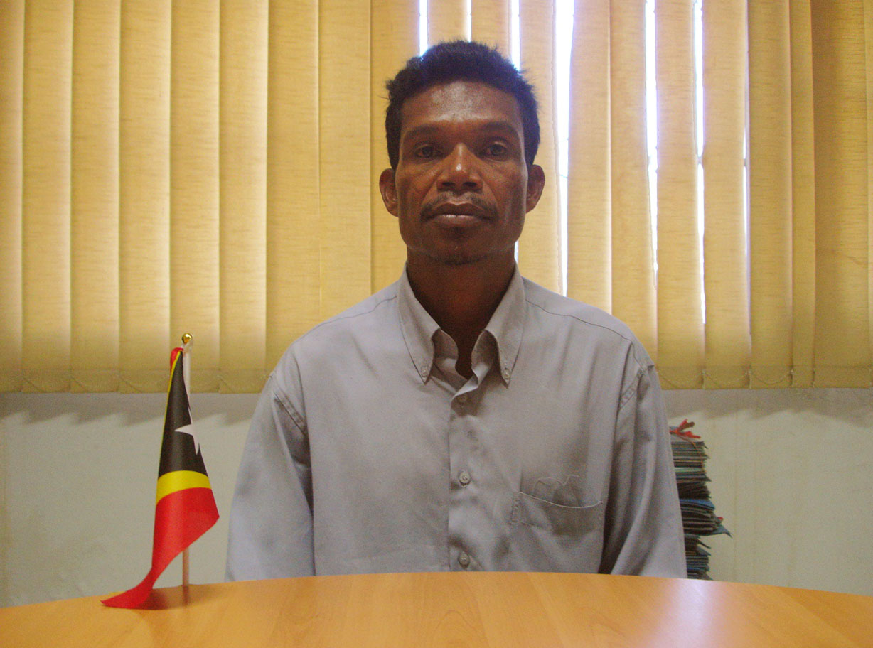 Rui Soares, Administrator des Subdistrikts Laclubar